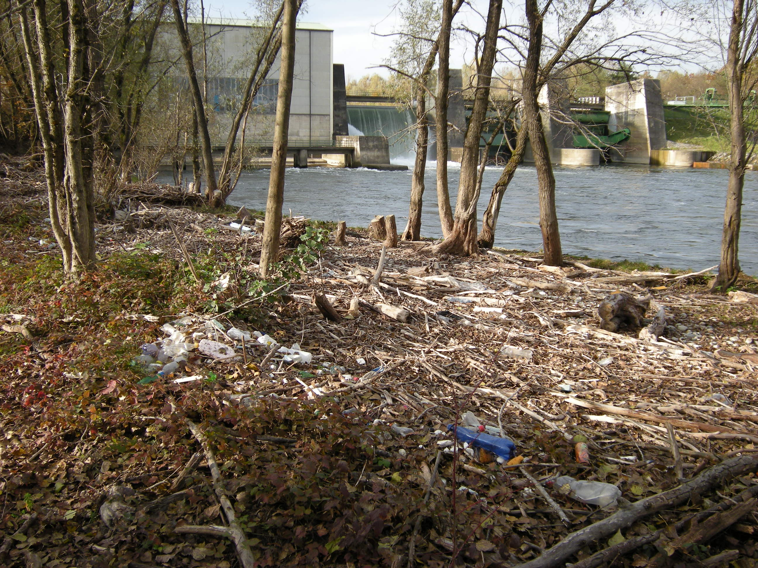 Staustufe Gralla